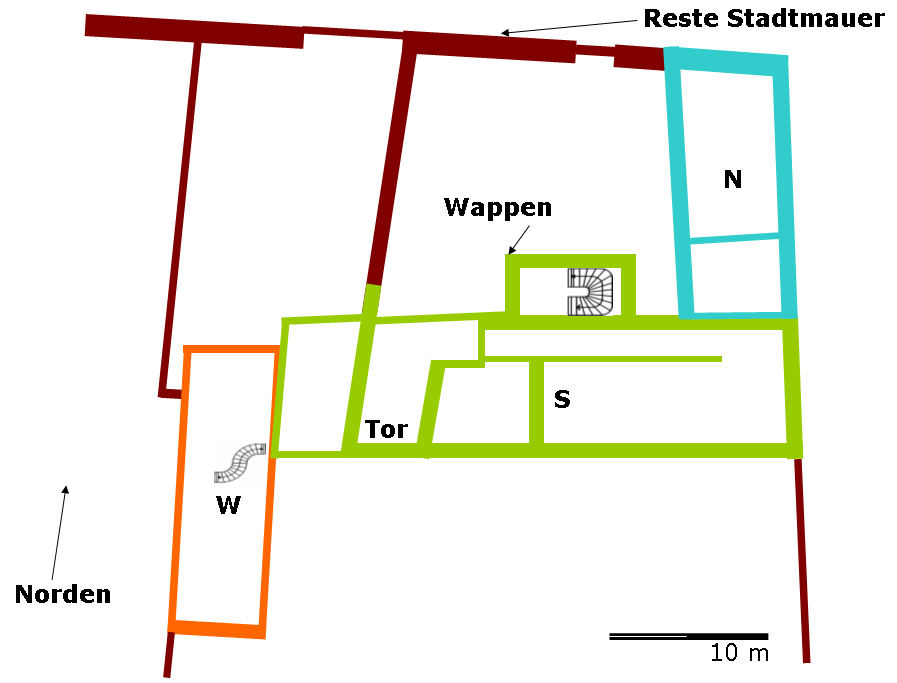 Schematisierter Grundriss des Darmstädter Schlosses in Groß-Umstadt vor 1940